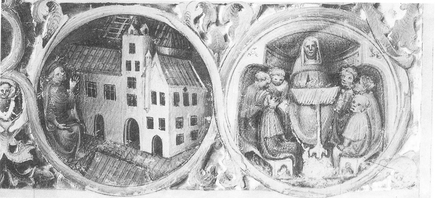 Universität Wien: Collegium ducale rechts Vorlesung der theologische Fakultät Miniatur